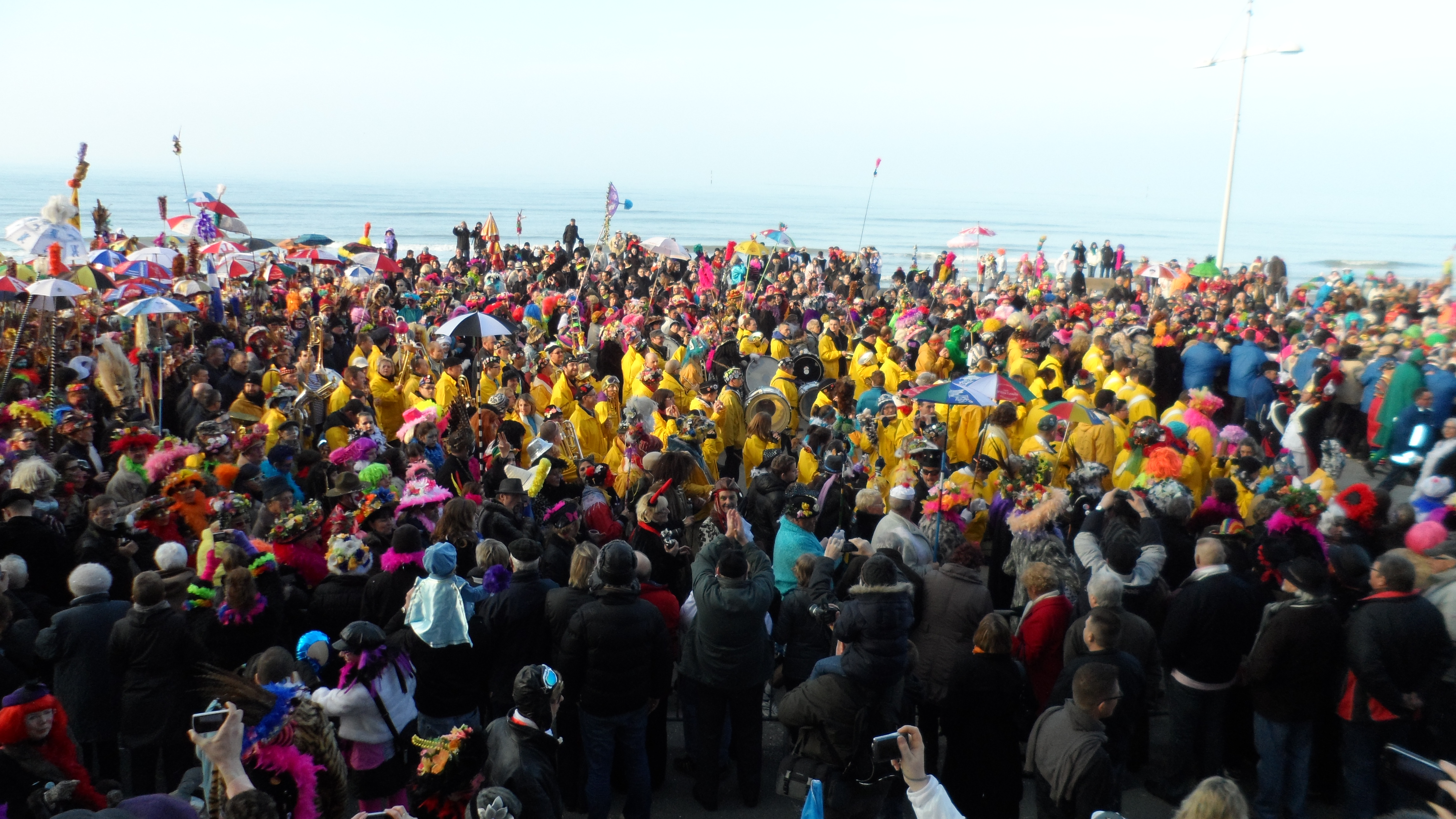 La "clique" (la fanfare) lors de la bande de Malo-les-Bains